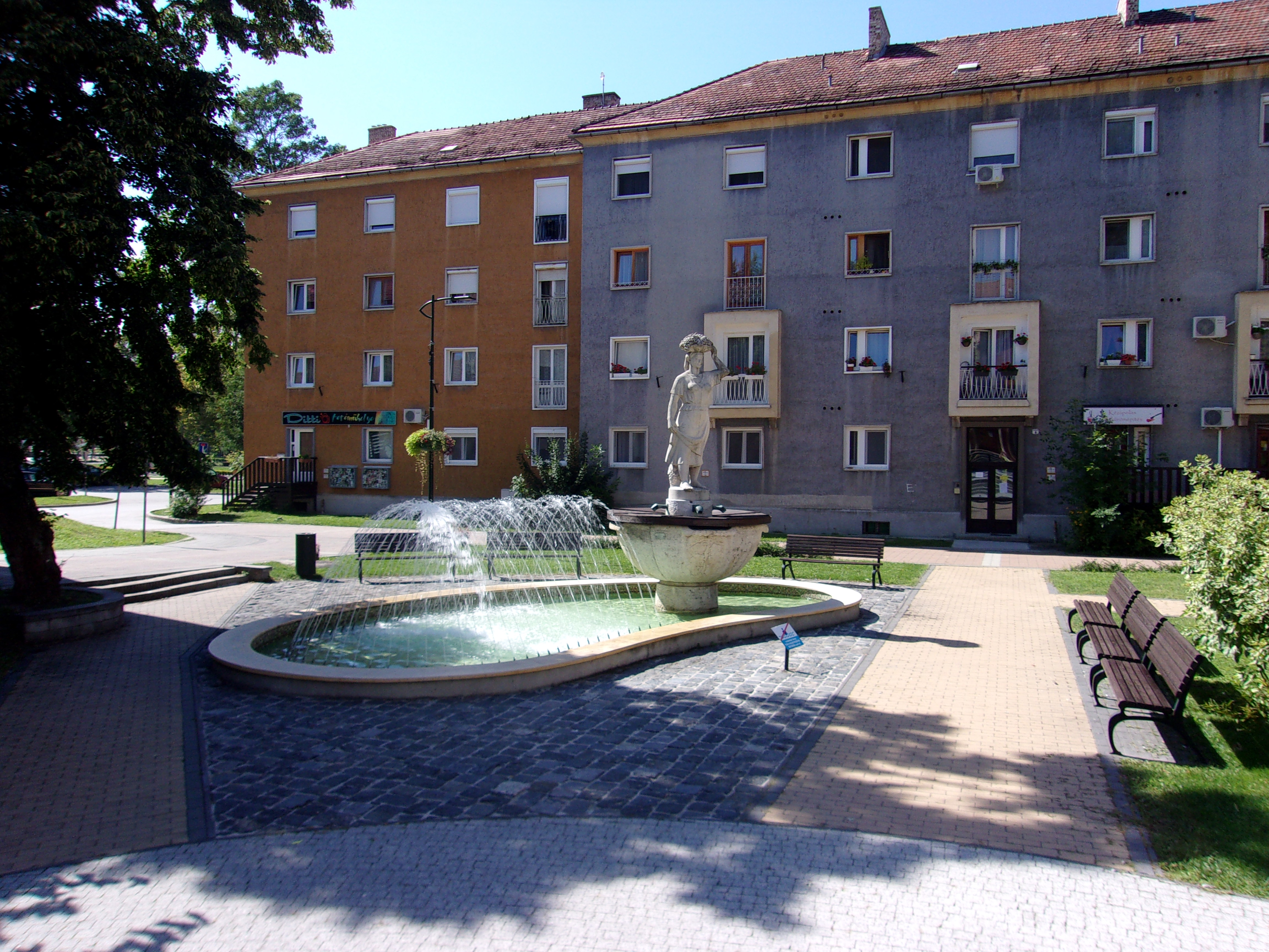 Ohmann Béla: Szüret c. szobra szökőkúttal Kazincbarcikán